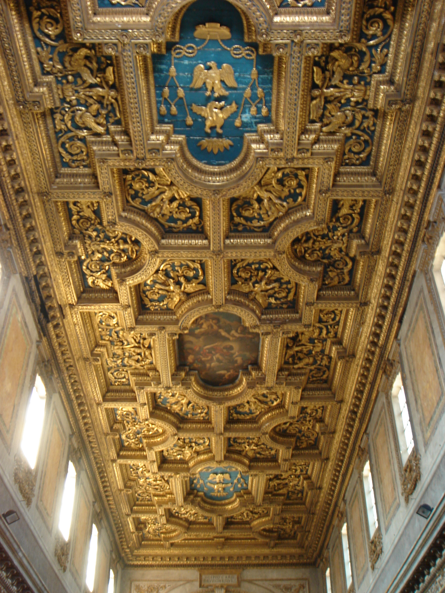 Roma, San Crisogono (rione Trastevere): soffitto a lacunari con stemmi del cardinale Scipione Borghese.